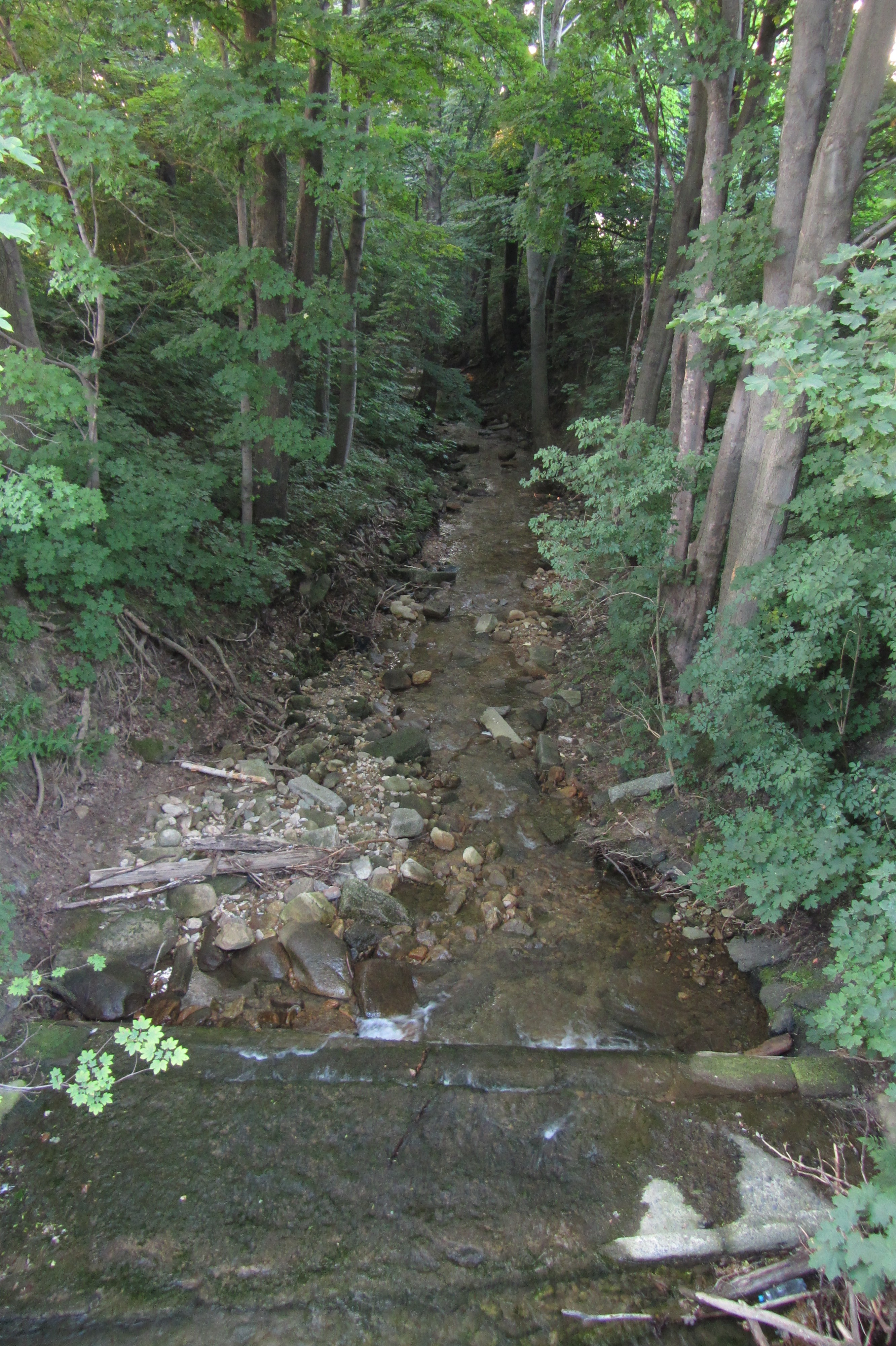 Ztracený potok ve Frýdlantském výběžku. Foceno z mostu přes potok na silnici spojující Ludvíkov pod Smrkem a Nově Město pod Smrkem. Pohled severozápadním směrem (po proudu)